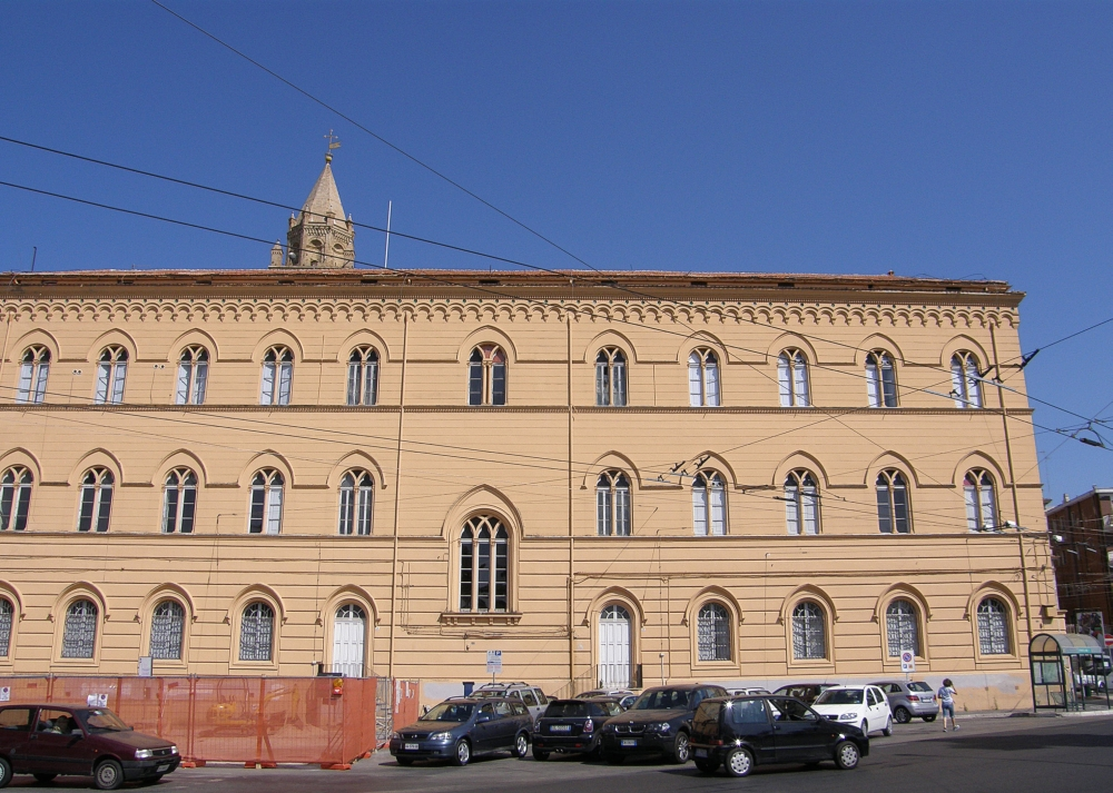 Chieti Tribunale di Chieti, un tempo sede della Regia Udienza.